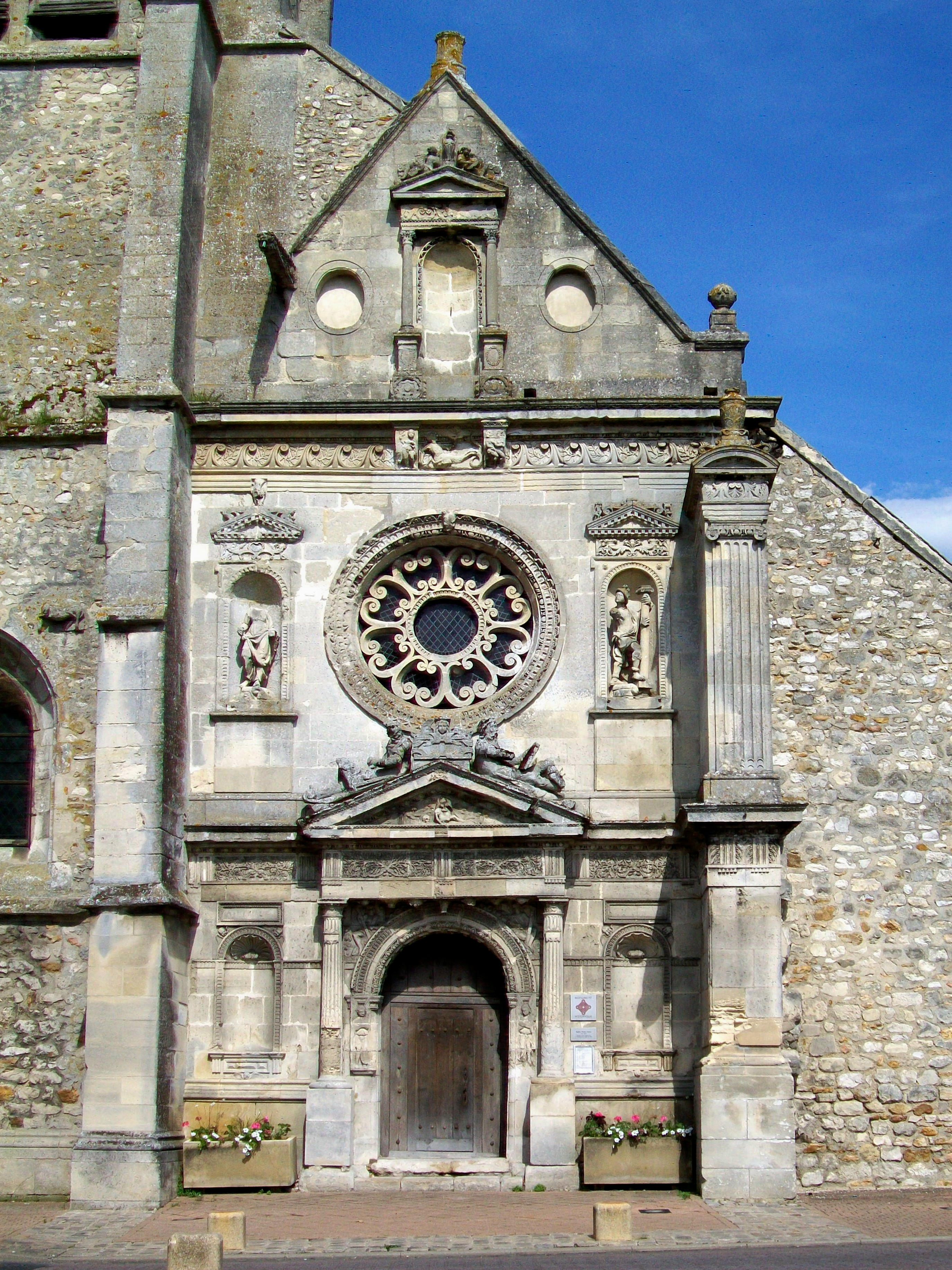 La façade Renaissance de 1555-1573.